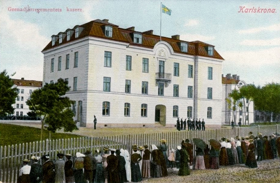 Kanslibyggnad vid Karlskrona grenadjärregemente i Gräsvik, Karlskrona.